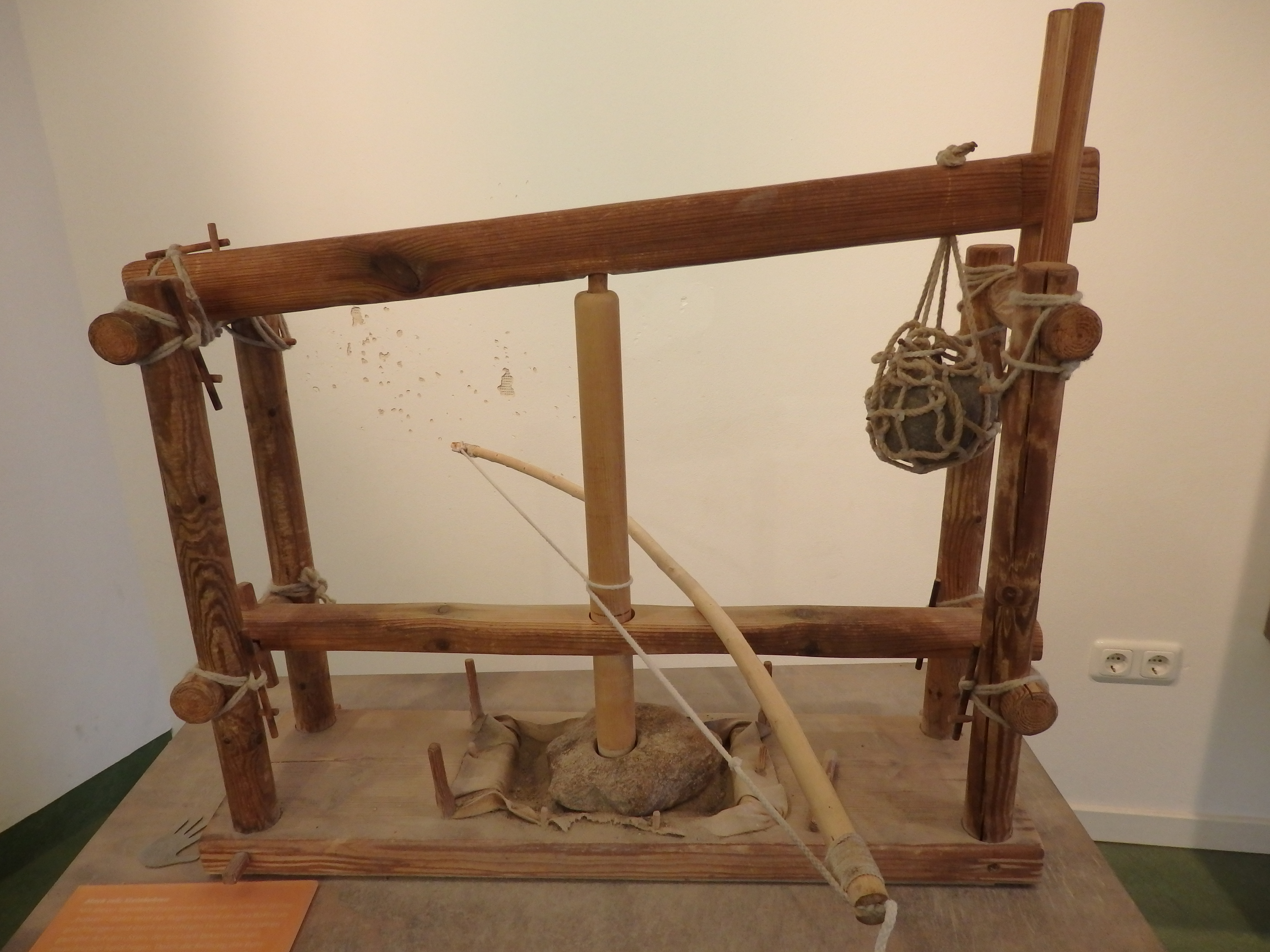 Rekonstruktion einer frühgeschichtlichen Installation zur Steinbohrung im Museum zeiTTor, Neustadt/Holstein